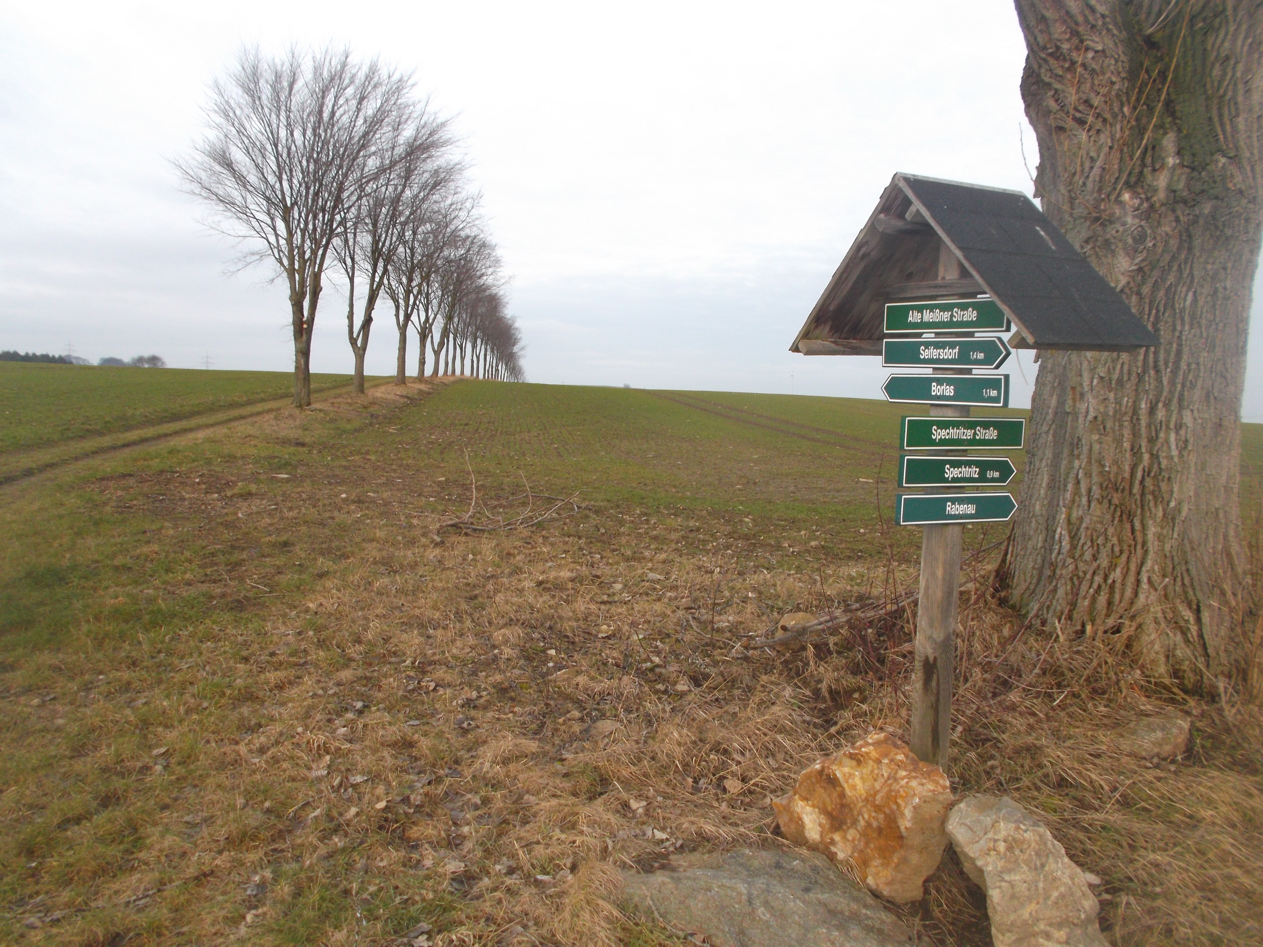 Alte Meißner Straße bei Seifersdorf/Dippoldiswalde Abzweig Spechtritzer Straße